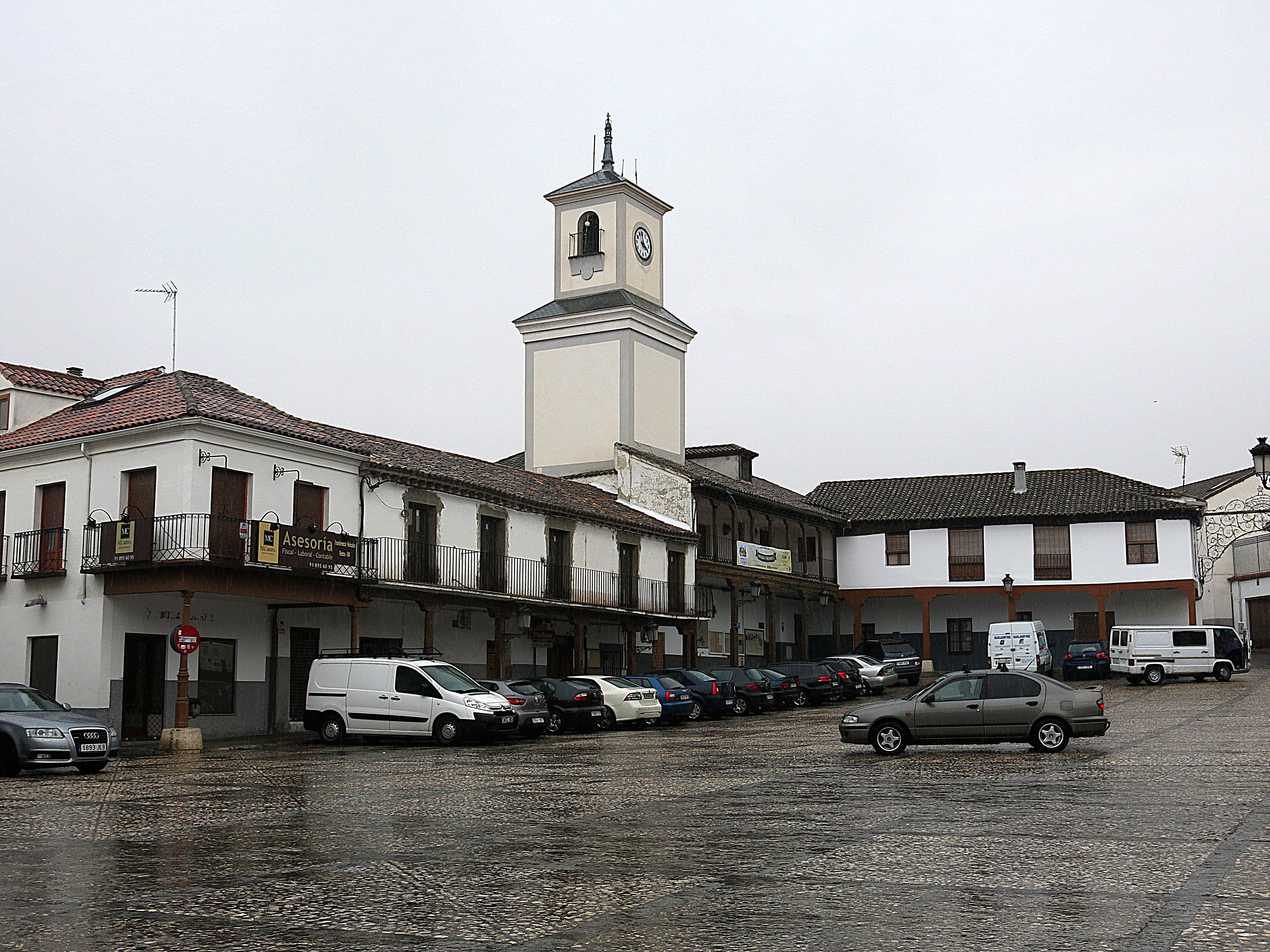 Plaza mayor y torre del reloj de Valdemoro